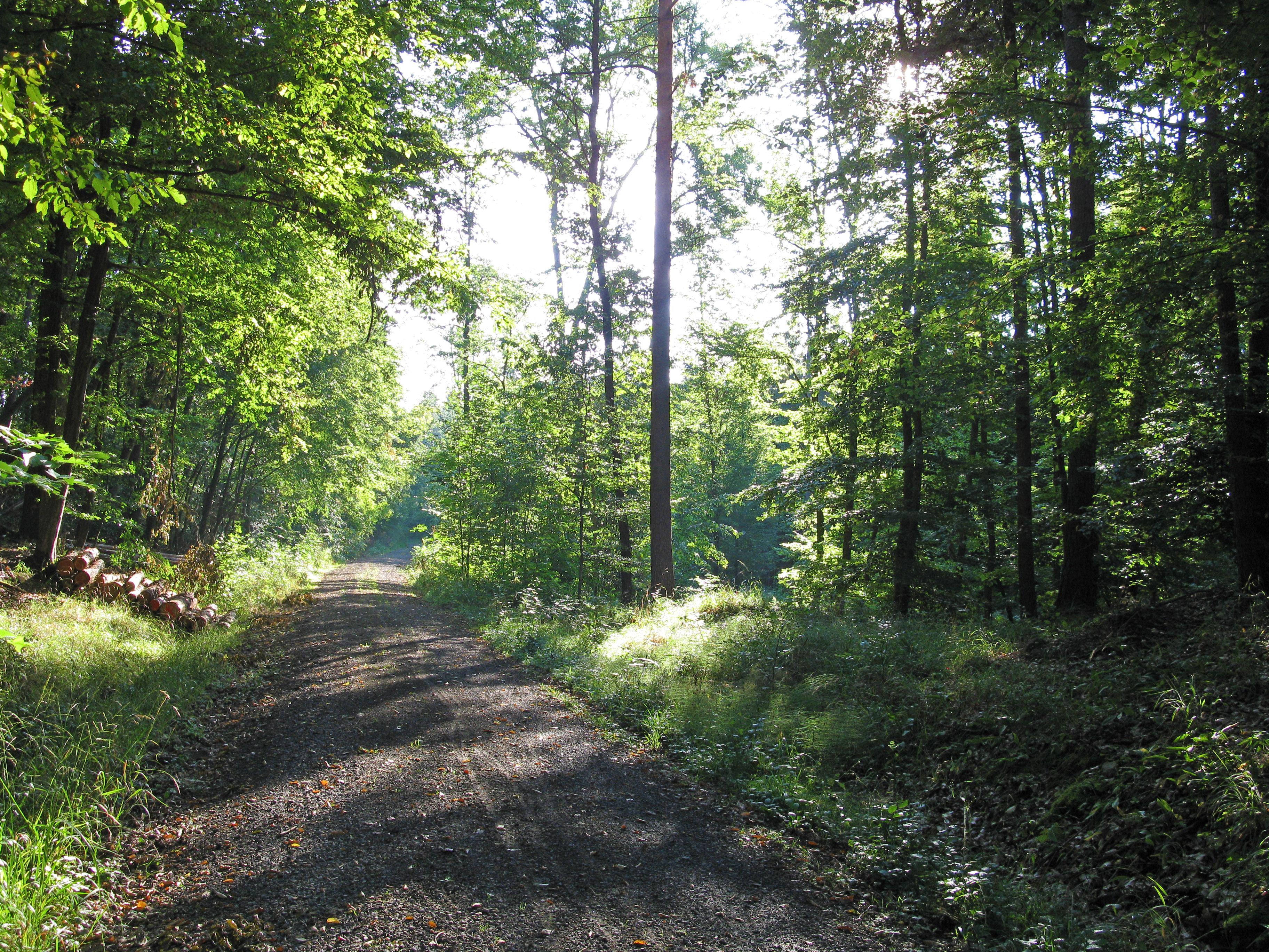 (NSG:BY-NSG-00605.01)_Naturwaldreservat Stachel